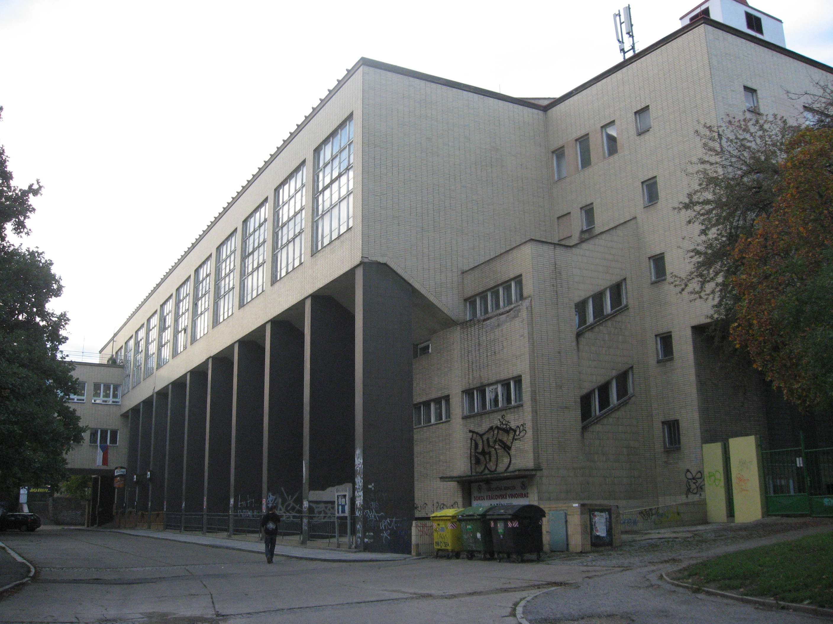 Riegrovy sady, budova Sokola Královské Vinohrady